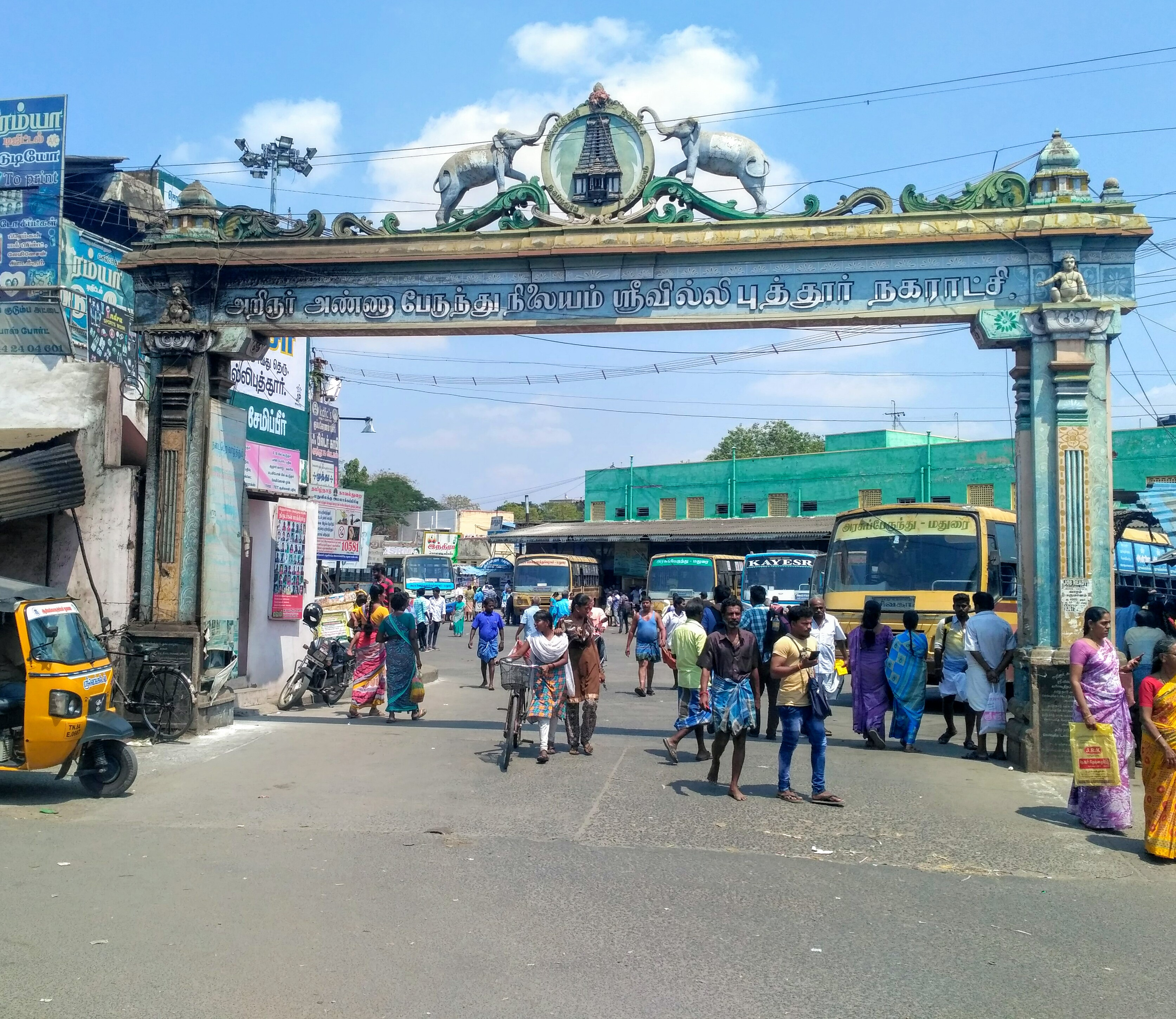 ஸ்ரீவி பேருந்து நிலையம்